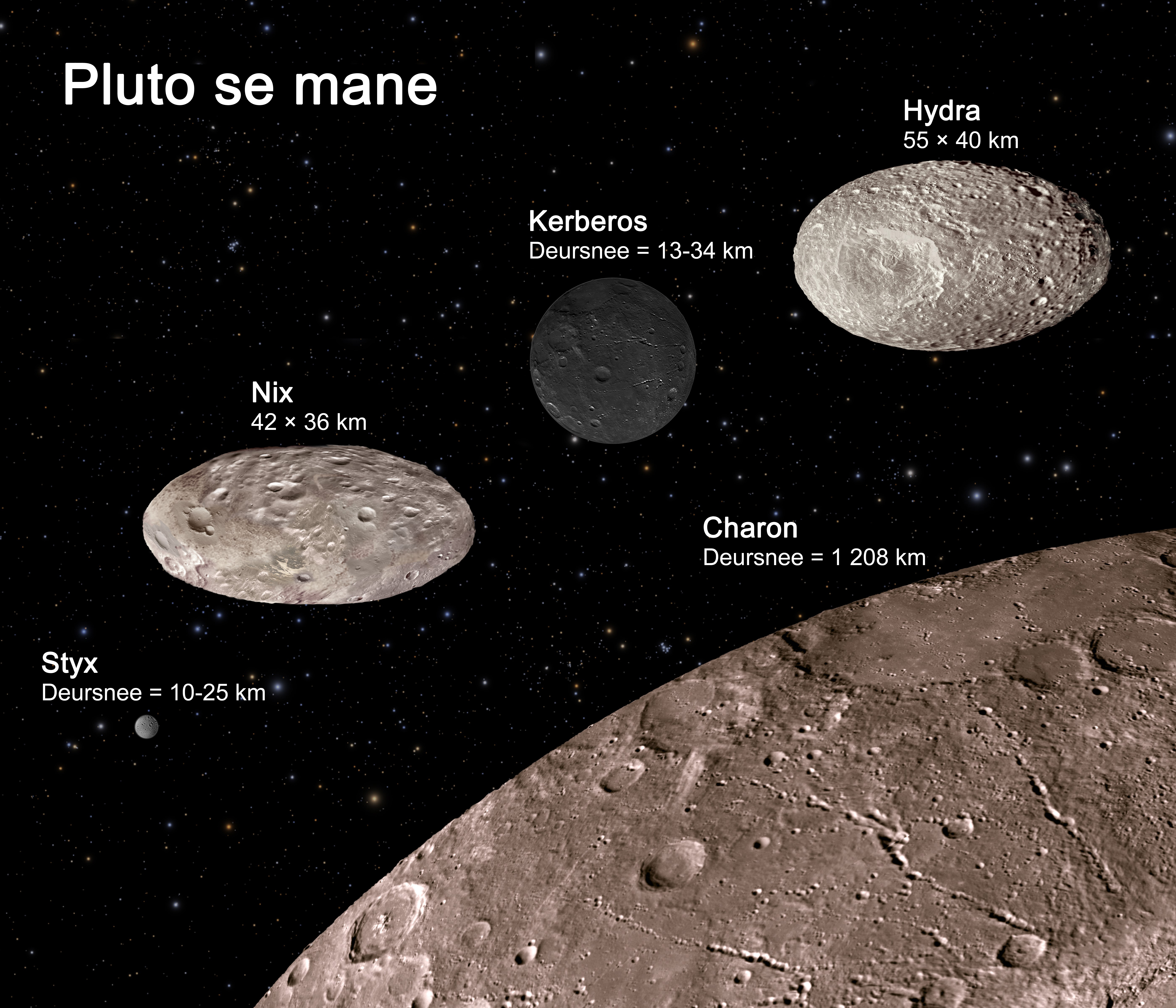 Pluto se mane